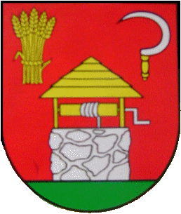 Mnou vyfotený Erb